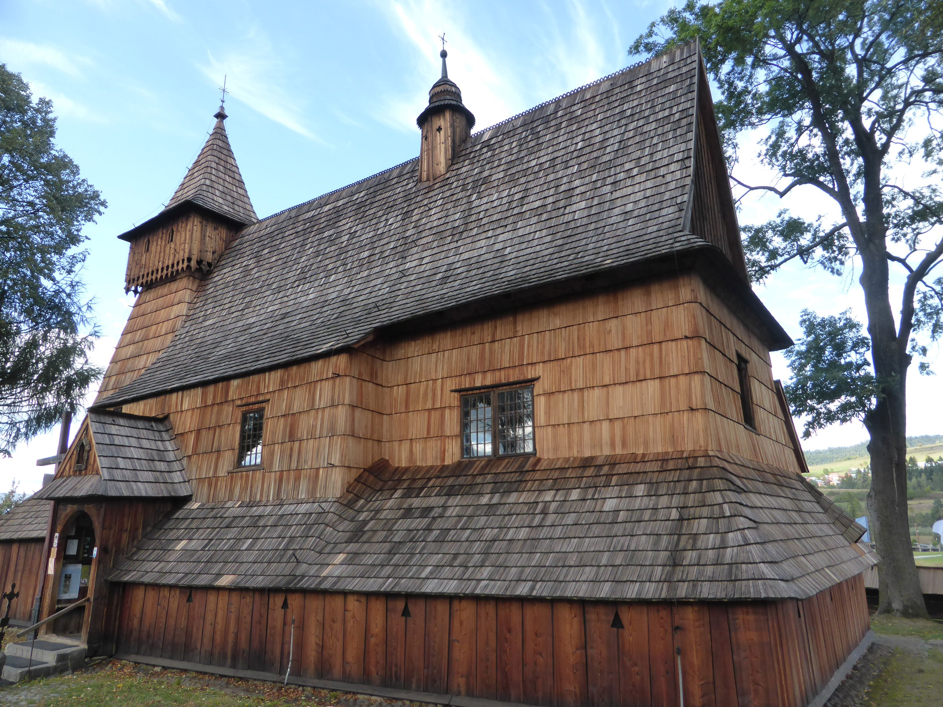 Erzengel_Michael_Kirche_in Debno_Podhalanskie (Kircheninneres)